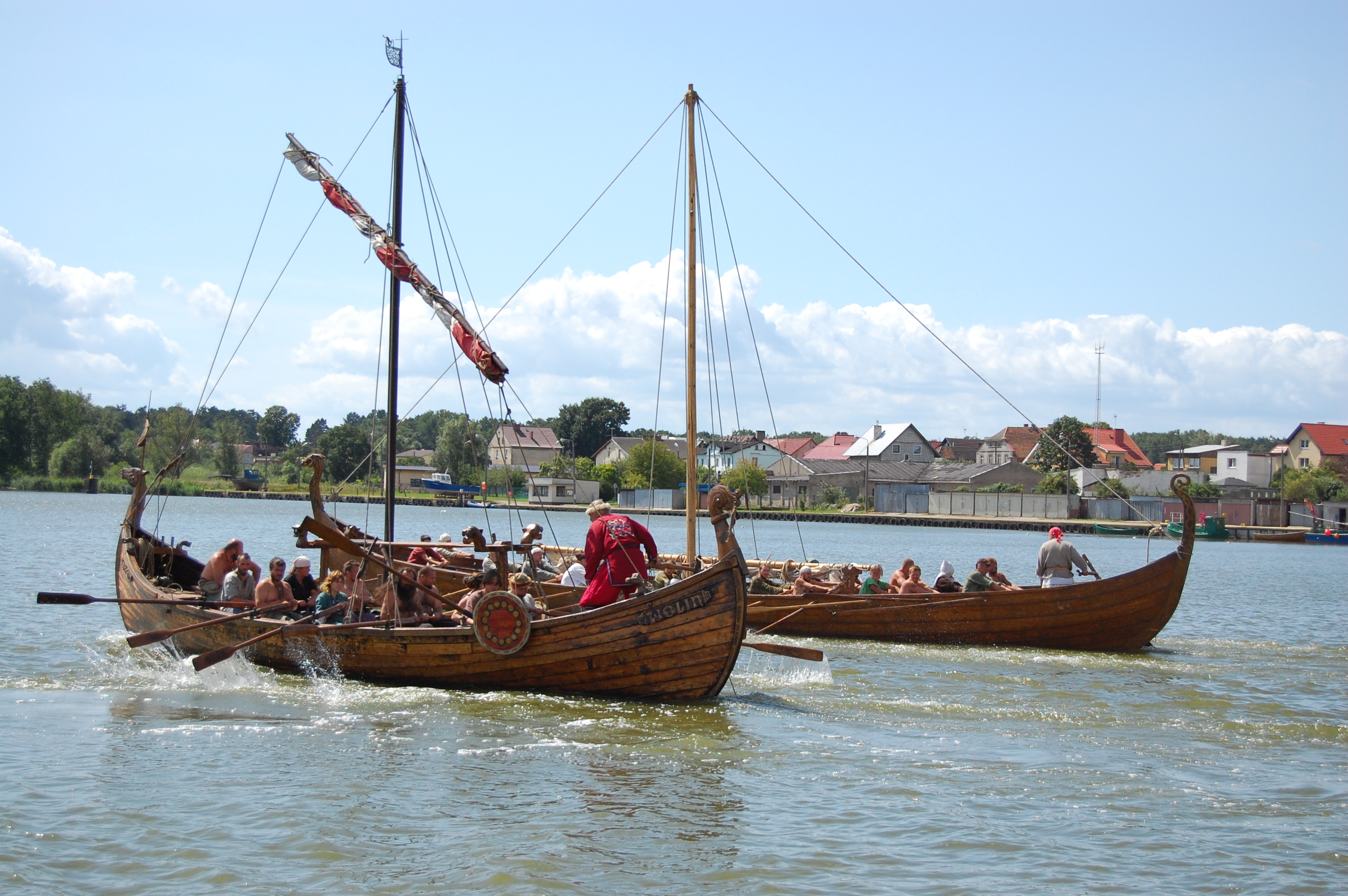 Festiwal Słowian i Wikingów w 2009 roku